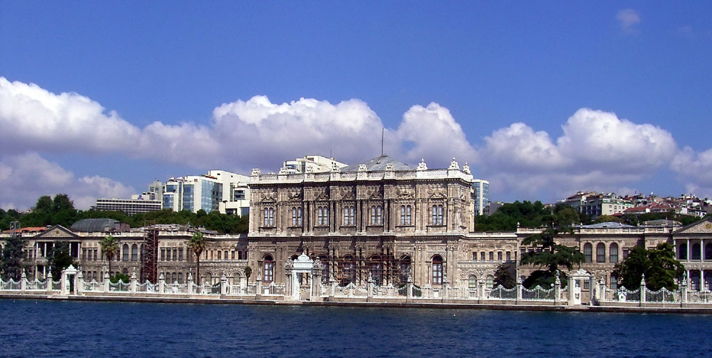 Dolmabahce-Palast vom Meer aus gesehen Quelle: selbst fotografiert, gemeinfrei Fotograf: Robert Raderschatt 12:14, 18. Nov 2004 Robert.raderschatt 1024 x 515 (174910 Byte) (Dolmabahce Palast, selbst fotografiert, gemeinfrei) 12:13, 18. Nov 2004 Robert.raderschatt 1024 x 515 (174910 Byte)